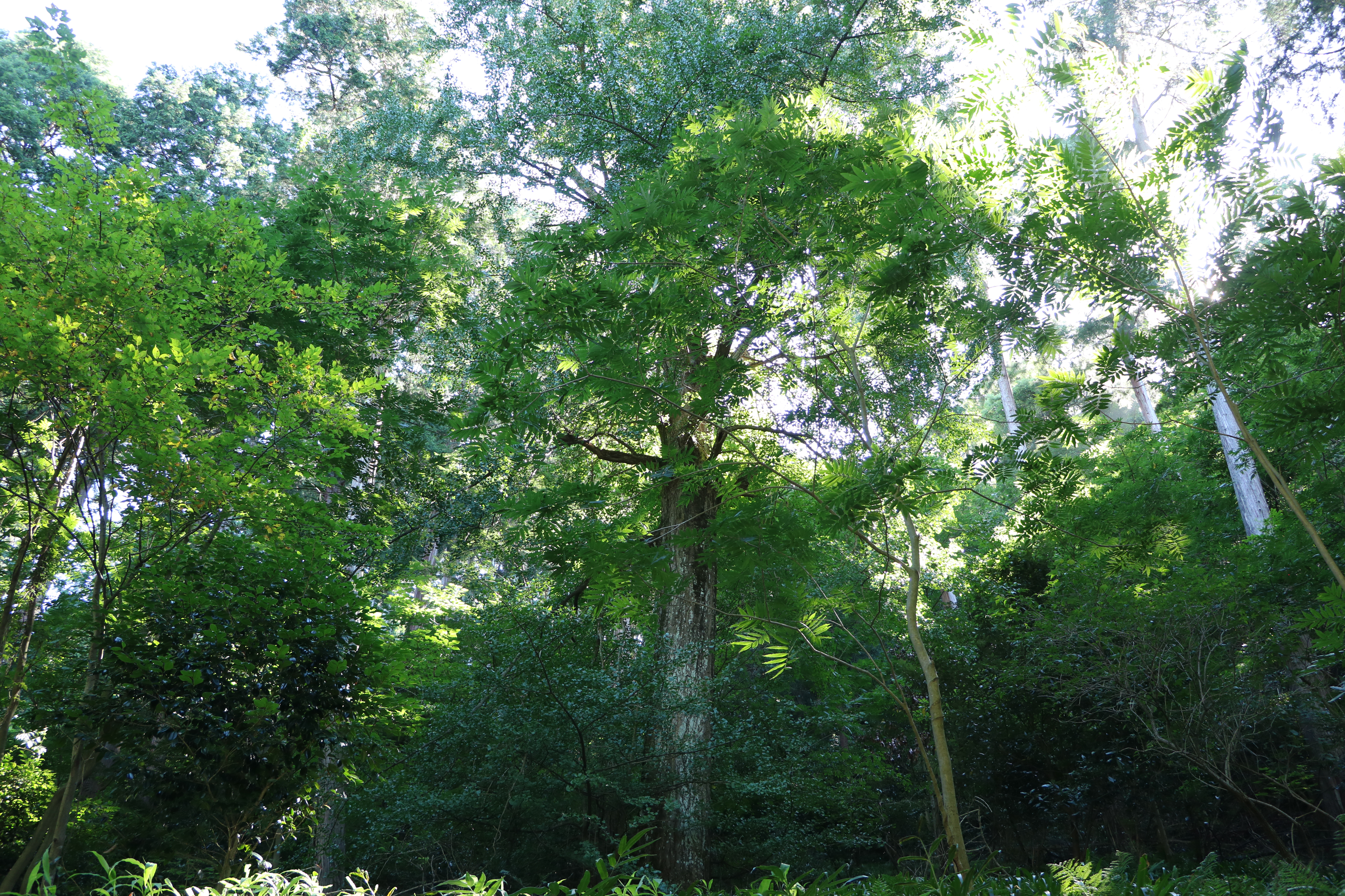 杉森神社のオハツキイチョウ東側の株（国指定天然記念物、福井県大飯郡高浜町）